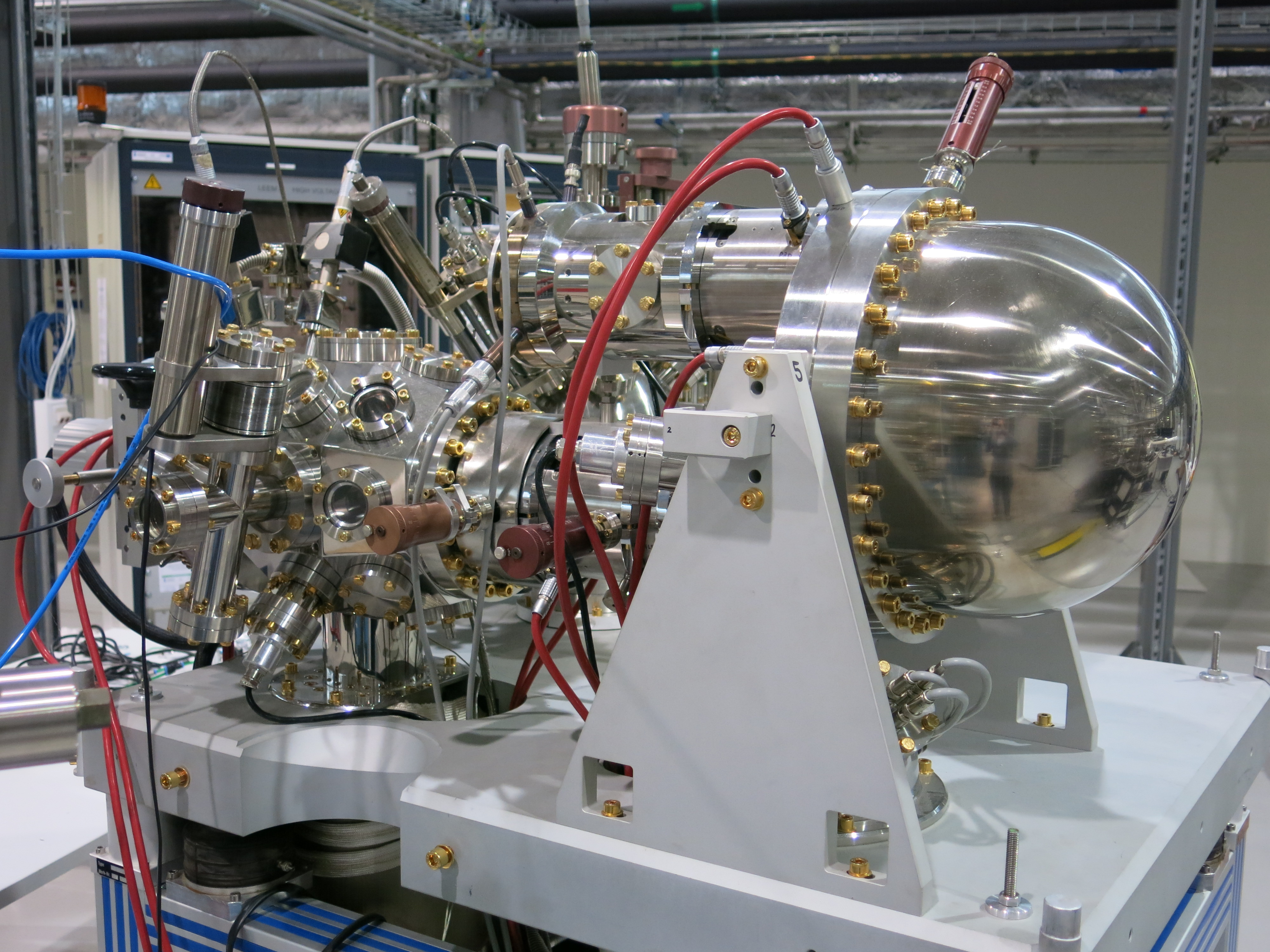 Stacja badawcza PEEM, dołączona do linii badawczej PEEM/XAS, znajdującej się w synchrotronie SOLARIS w Krakowie.